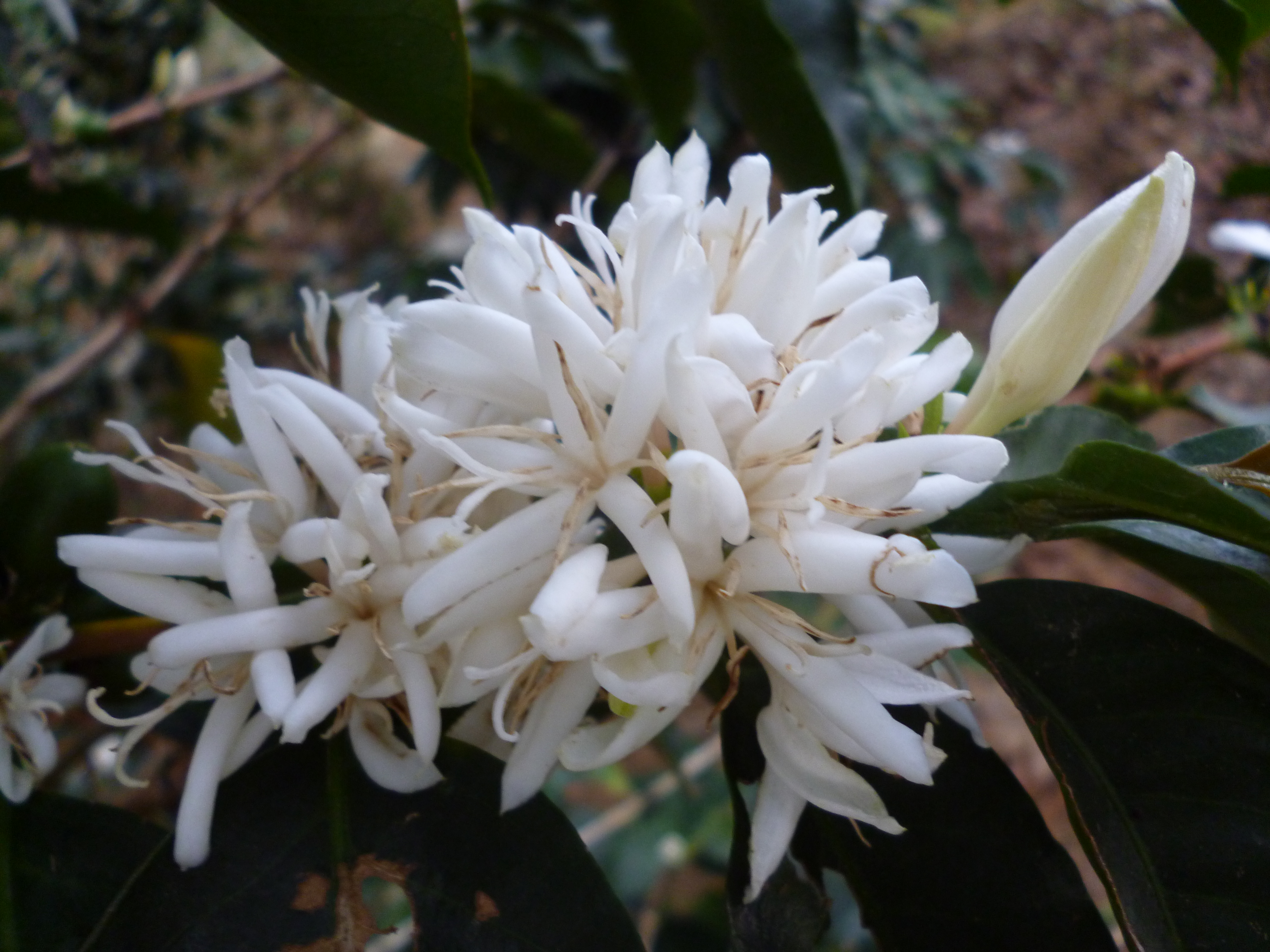 Flor de café tipo caturro-arabica, San Roque, Colombia